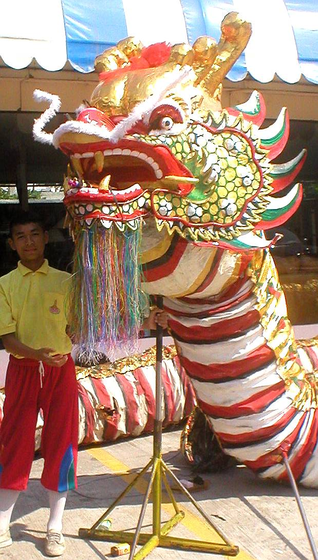 Dragon traditionnel pour les fêtes du Nouvel An chinois Prise de vue personnelle Utilisateur:Siren 9 février 2005